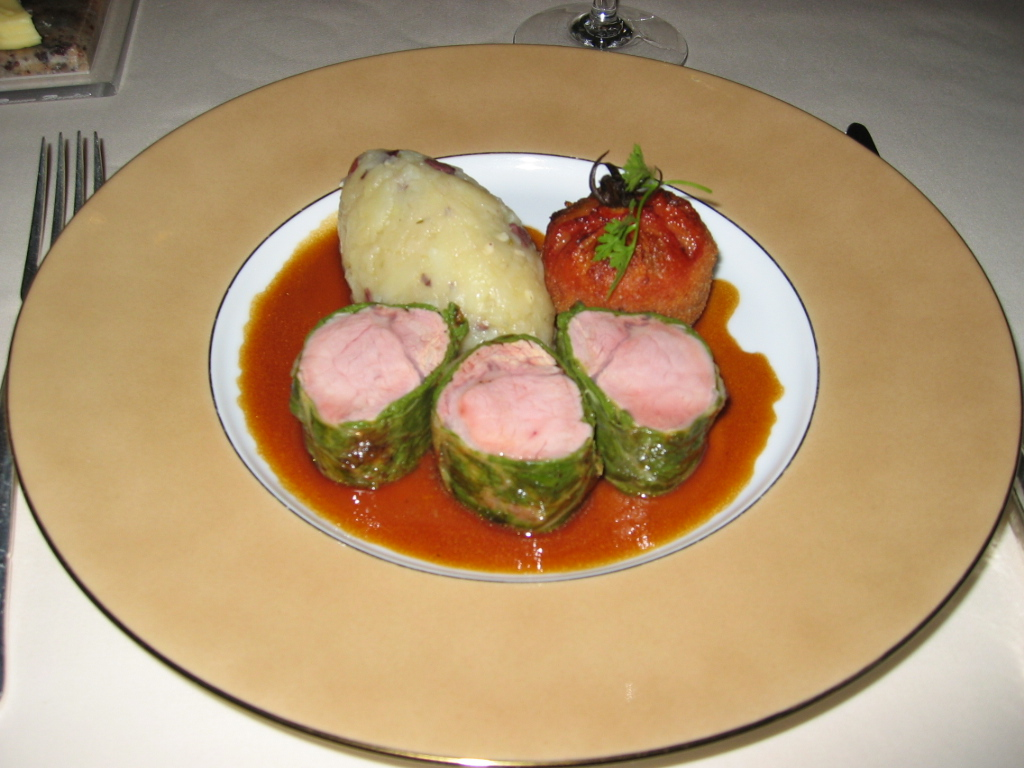 Auberge Marc et Paul Haeberlin - Alsace